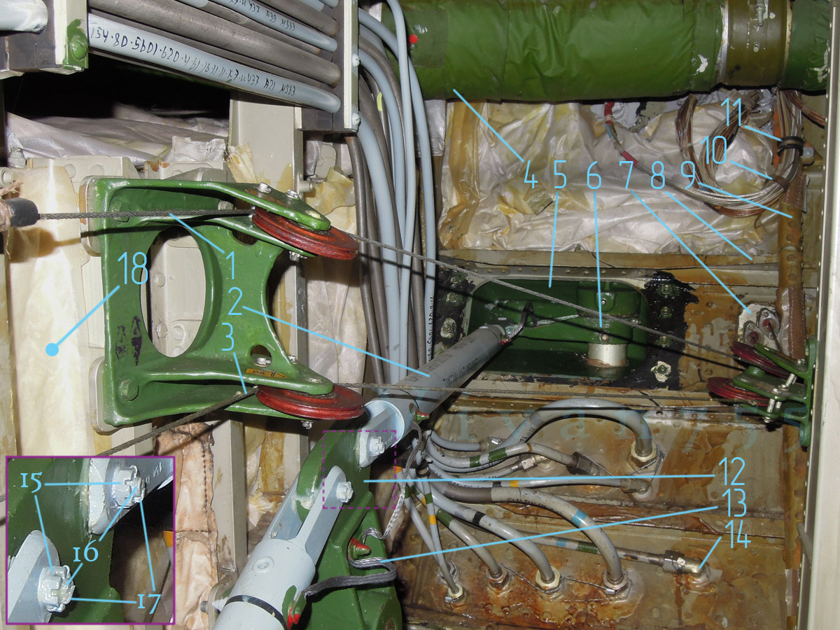 Задний лонжерон крыла Ту-154Б-2 и борт фюзеляжа с гермовыводами. 1 — трос уборки интерцепторов, 2 — тяга элерона, 3 — трос выпуска интерцепторов, 4 — трубопровод обогрева, 5 — гермовывод тяги, 6 — качалка гермовывода, 7 — гермовывод тросов, 8 — стрингер, 9 — шпангоут, 10 — бандаж, 11 — хомут, 12 — качалка, 13 — перемычка металлизации, 14 — гермовывод гидросистемы, 15 — корончатая гайка, 16 — призонный болт, 17 — контровочный шплинт, 18 — задний (третий) лонжерон центроплана, он же 49 шпангоут фюзеляжа